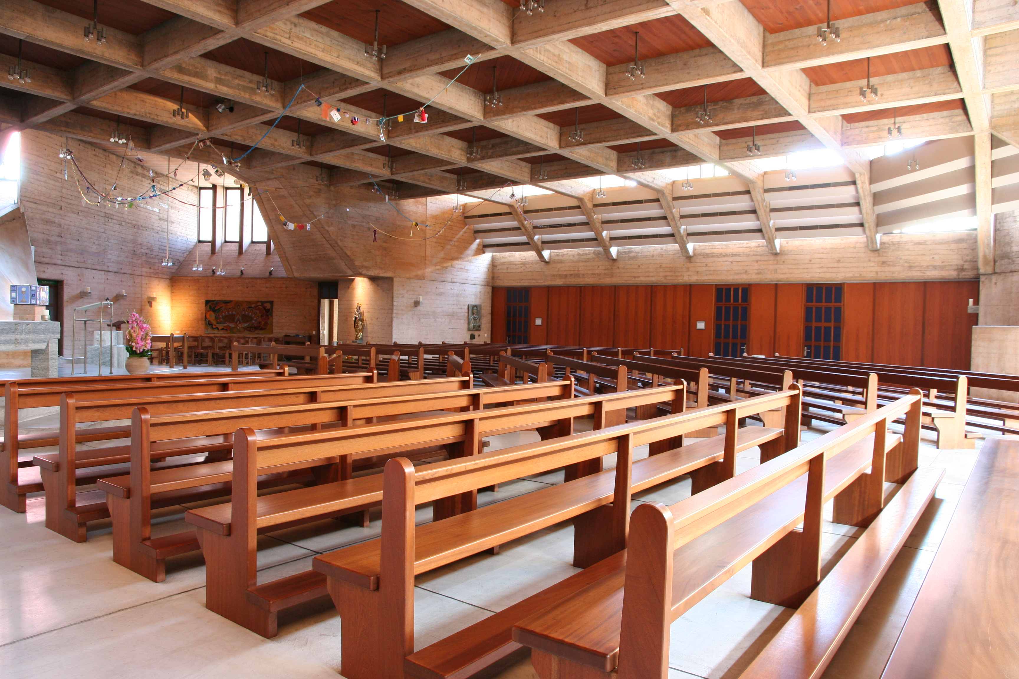 Römisch-katholische Pfarrkirche St. Martin Birmensdorf ZH